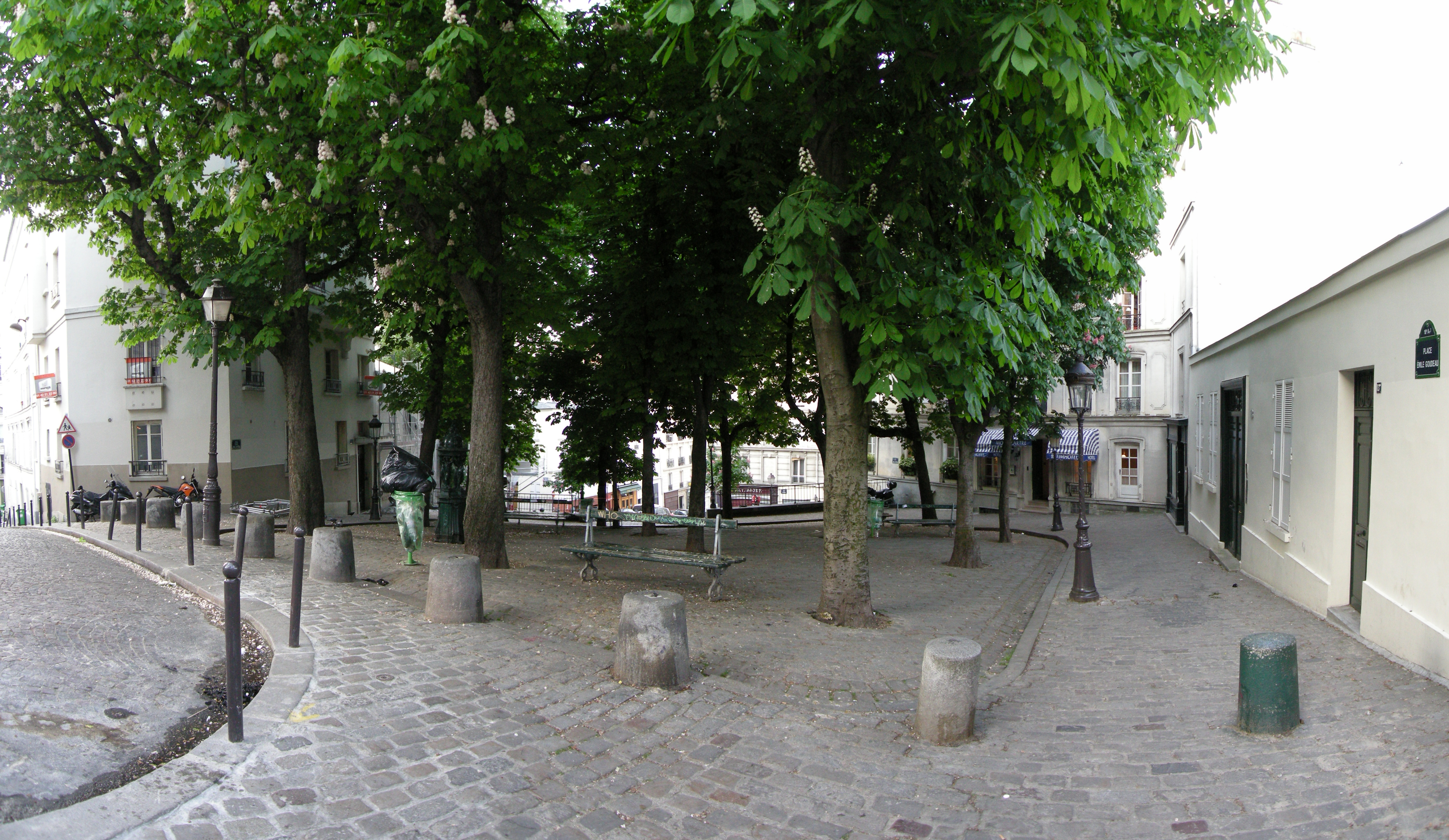 Place Emile Goudeau, Paris XVIIIe, France